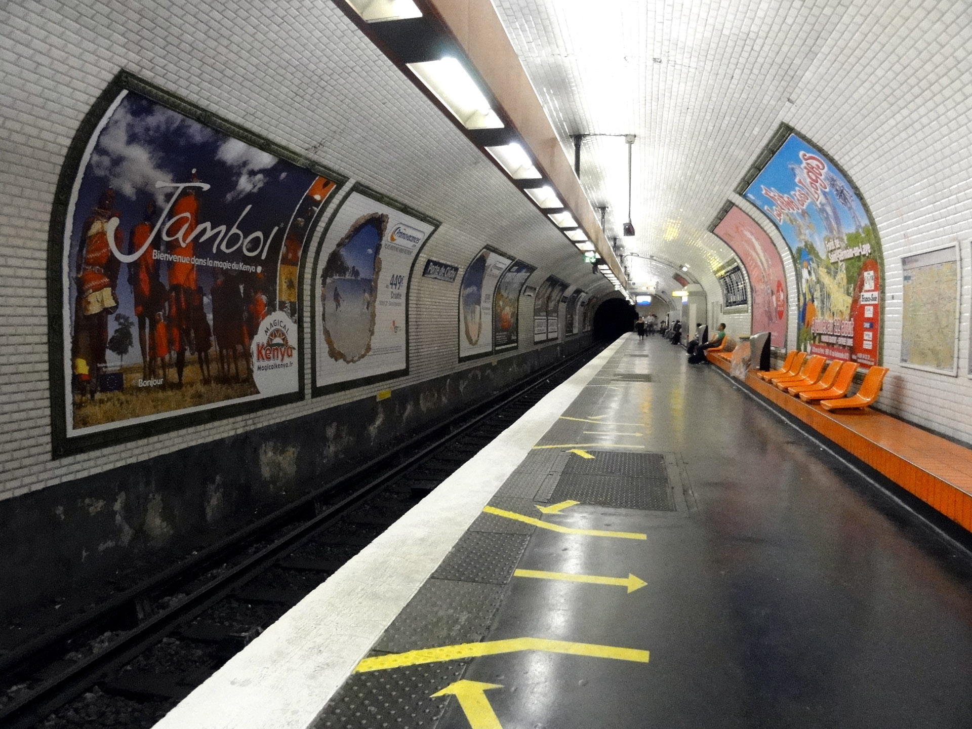 La station Porte de Clichy de la ligne 13 du métro de Paris, France